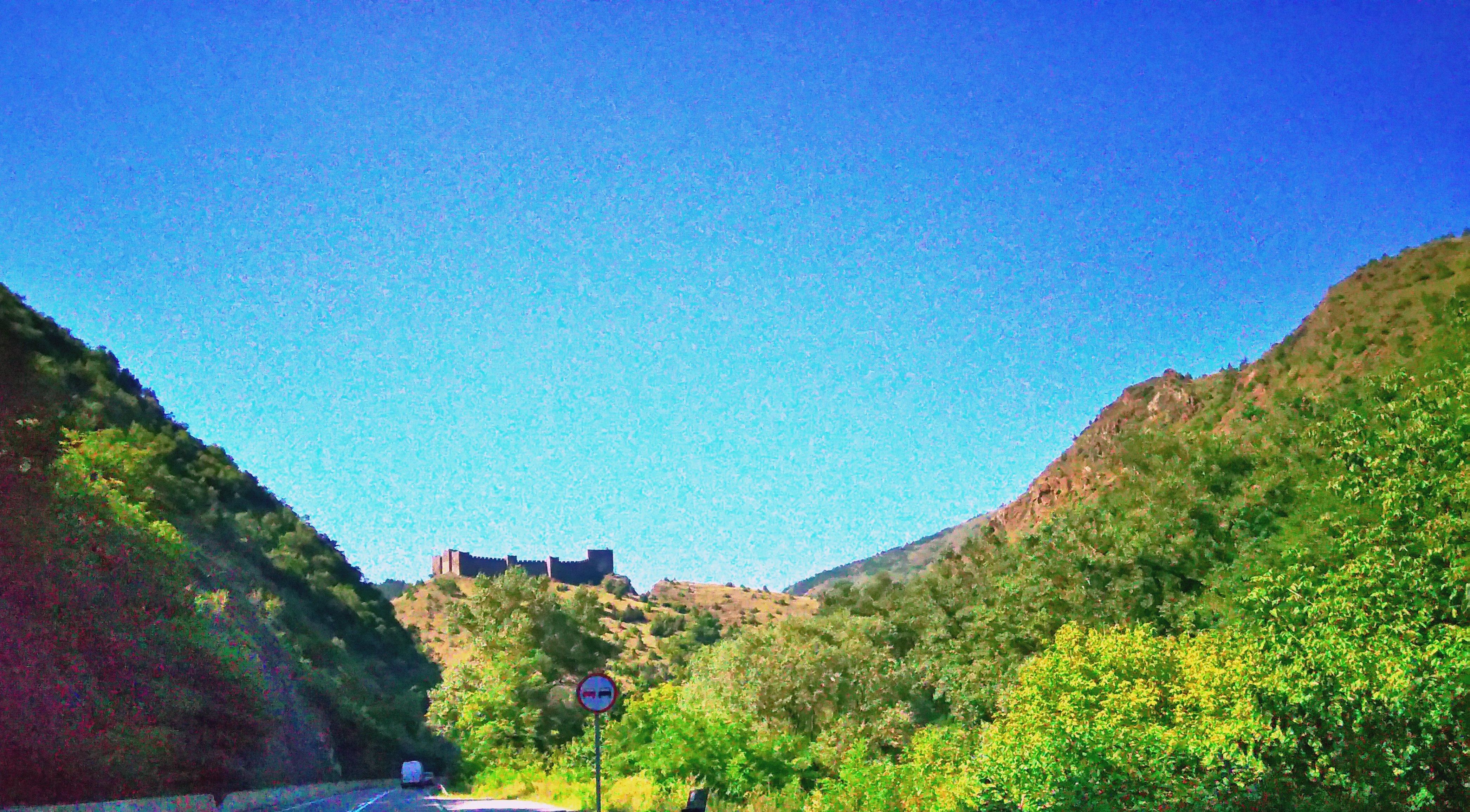 Маглич, панорамски снимак са Ибарске магистрале